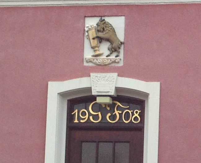 Türbeschriftung Brauereigaststätte Fottner Weißenburg i.Bayern